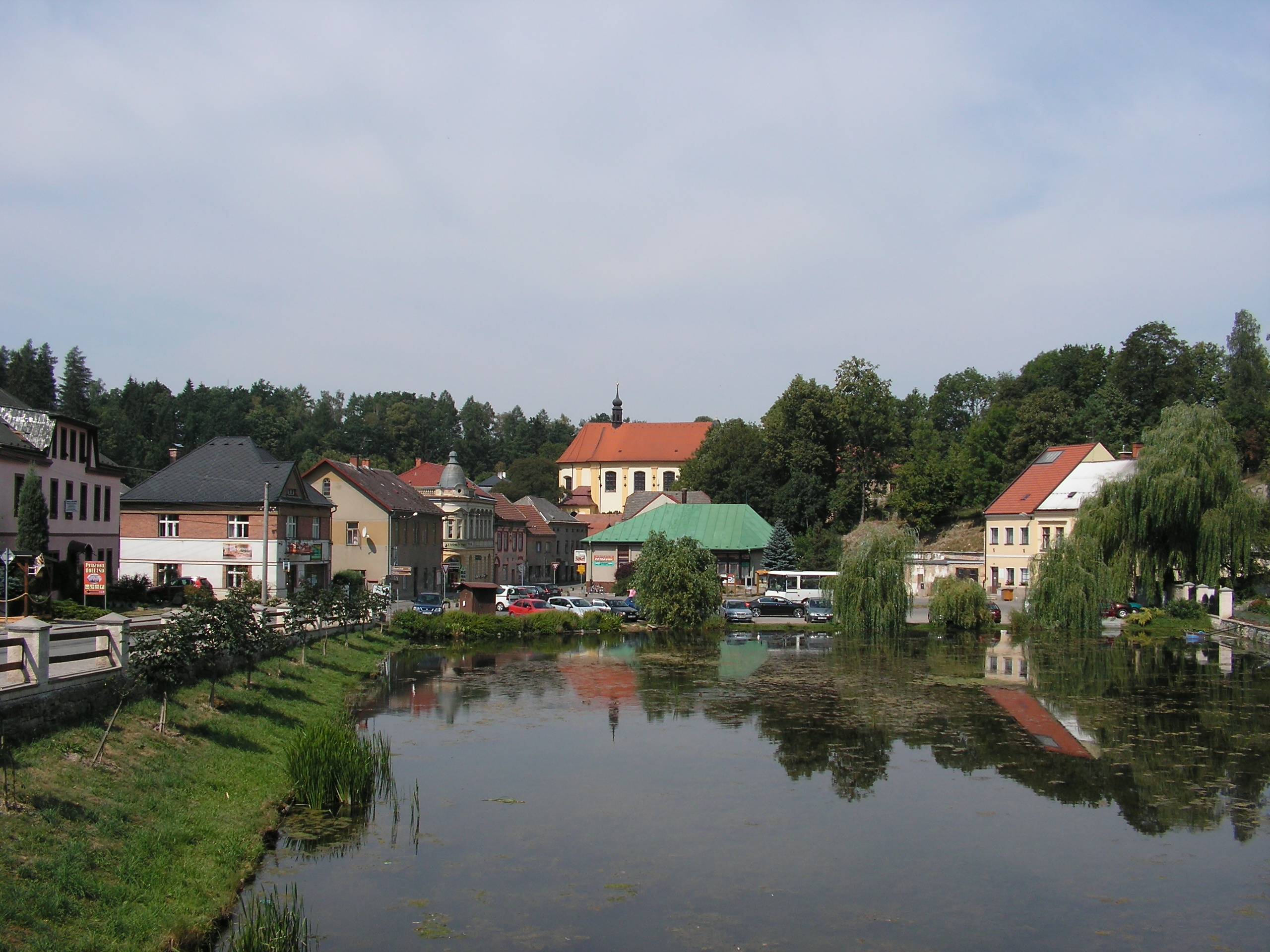 Pohled na rybník a místní parkoviště